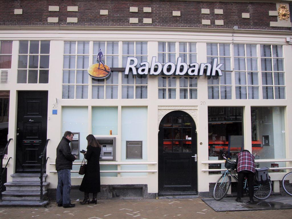 me - 26/11/2005 - Rabobank - Amsterdam